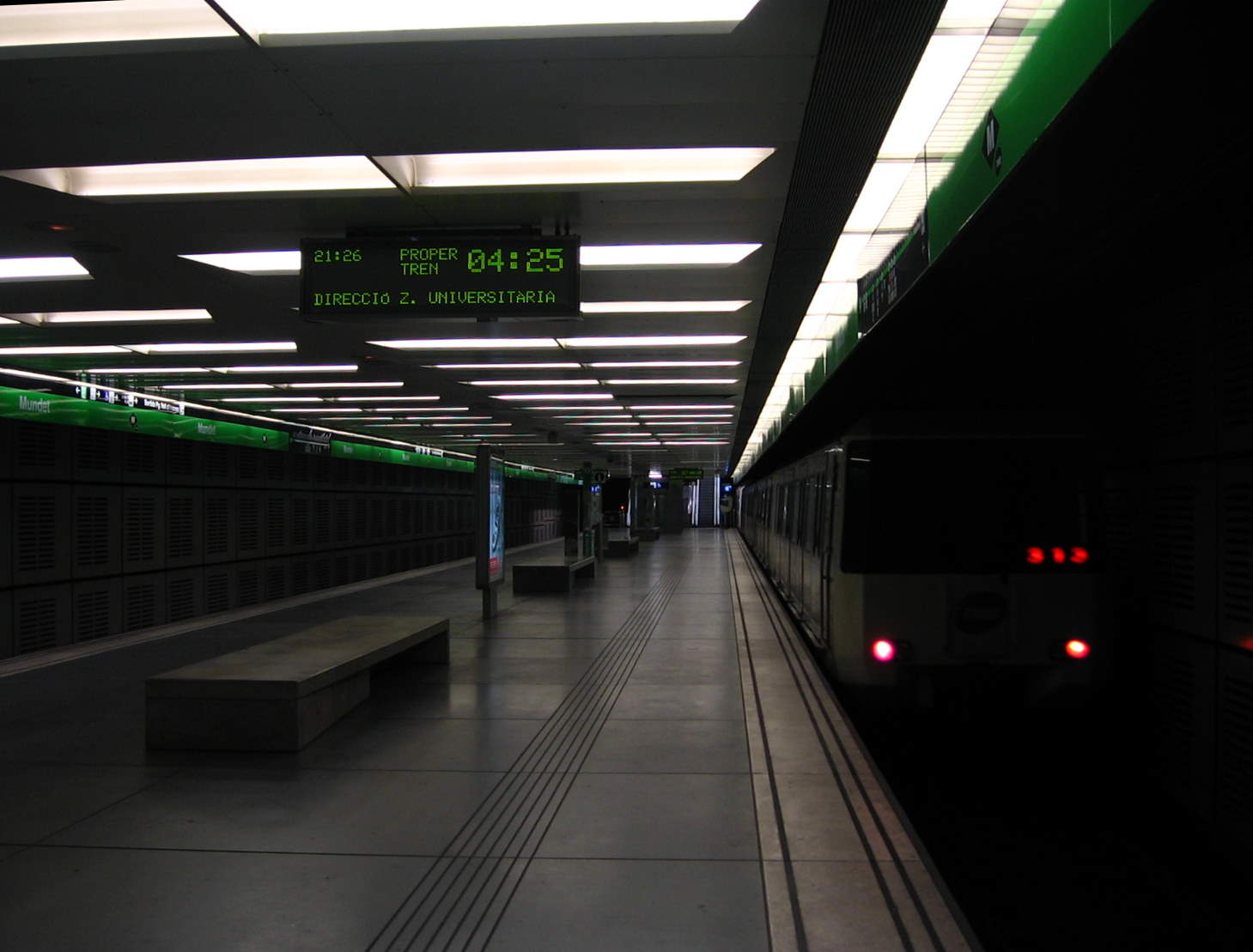 Platform of Mundet station, Barcelona Metro/Andana de l'estació Mundet, Barcelona